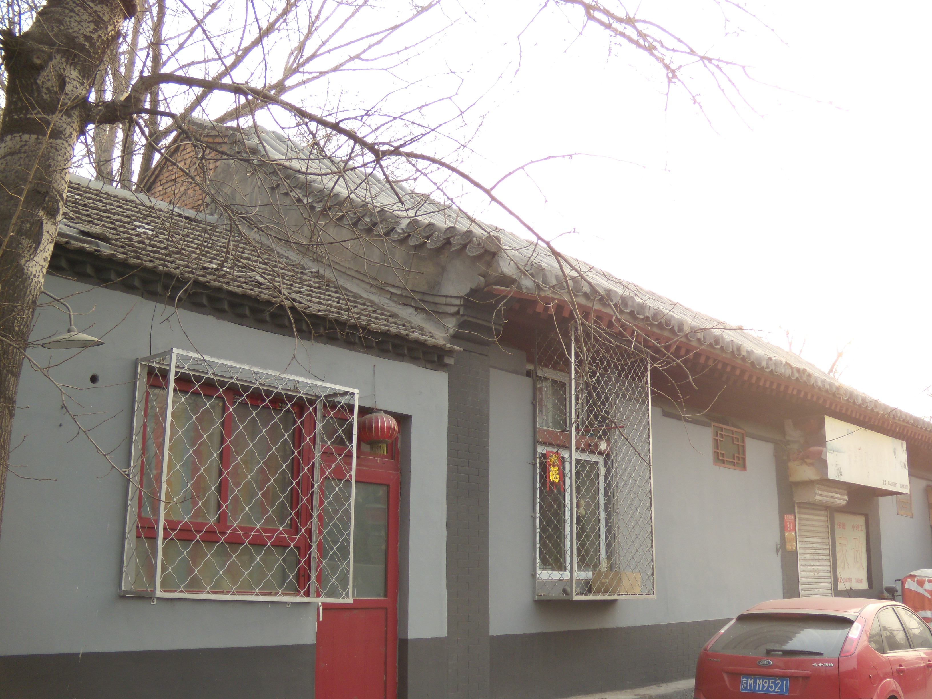 嵩祝院北巷东口南侧、法渊寺旧址以北的建筑